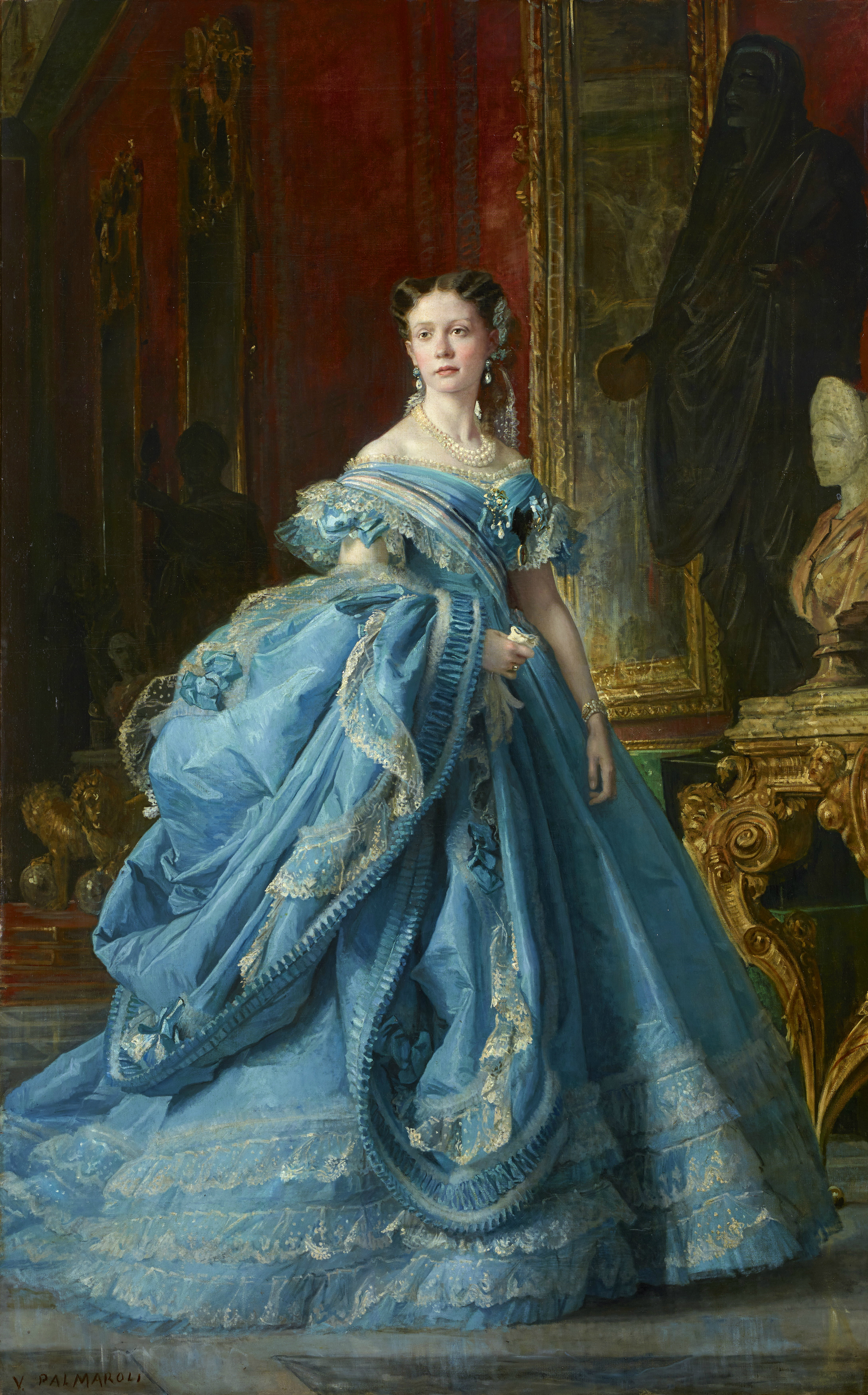 Retrato de la infanta Isabel de Borbón y Borbón (1851-1931), que fue hija de la reina Isabel II de España. La figura se presenta con el encanto de su edad, vistiendo quizá sus primeras galas de mujer, en una actitud natural y delicada. Vemos a la retratada llevando un vestido de gala color azul turquesa adornado con encajes, siguiendo la moda del Segundo Imperio francés, caracterizada por el contraste entre la cintura estrecha y la amplitud de la falda, con las mangas cortas y generoso escote que descubre los hombros. Las joyas con que se adorna son perlas en el broche, collar de tres vueltas, pendientes y pulsera. Cruza su pecho con las bandas de las órdenes femeninas otorgadas por las cortes europeas. La figura está representada con fondo de entonación roja y dorada, entre terciopelos, consolas doradas y bustos antiguos del Salón del Trono del Palacio Real de Madrid